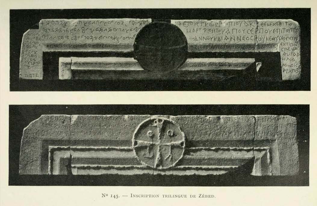 Inscription trilingue (grec, syriac, arabe) de l'église Saint Serge à Zébed datée de 512